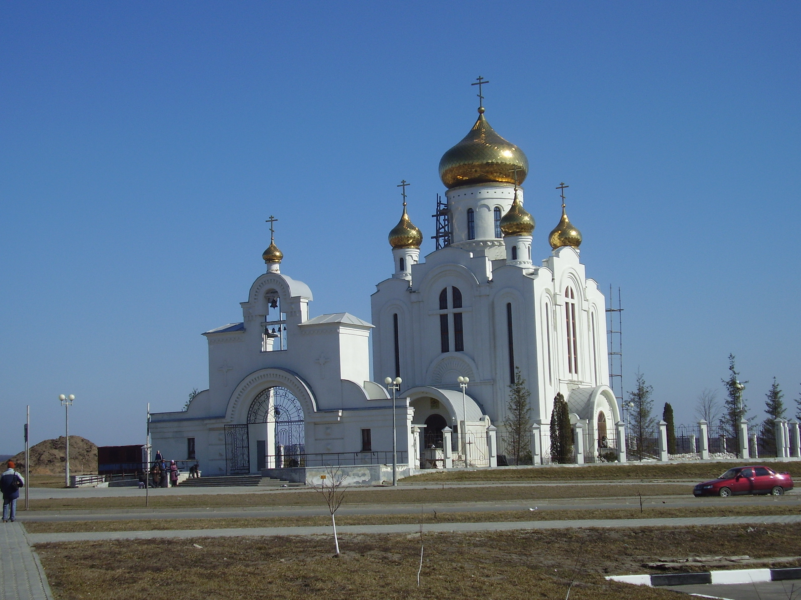 Старый Оскол, храм Рождества Христова